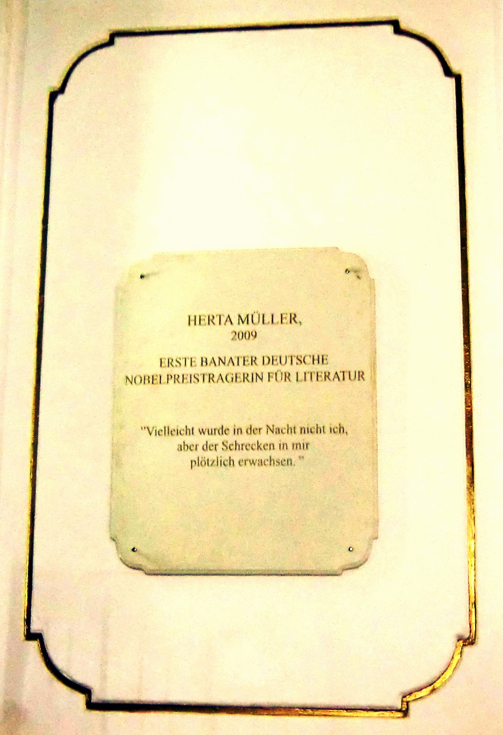 Herta Müller, Ehrentafel in der Eingangshalle des Nikolaus-Lenau-Lyzeums